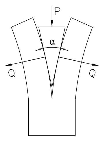 Wedge